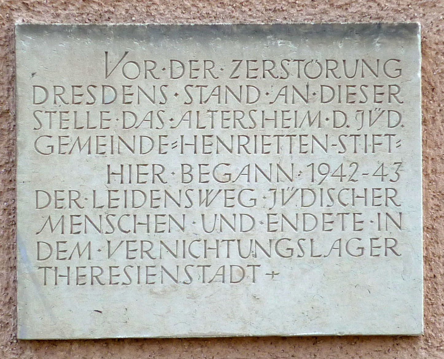 Haustafel an der Holbeinstr. in Dresden-Striesen